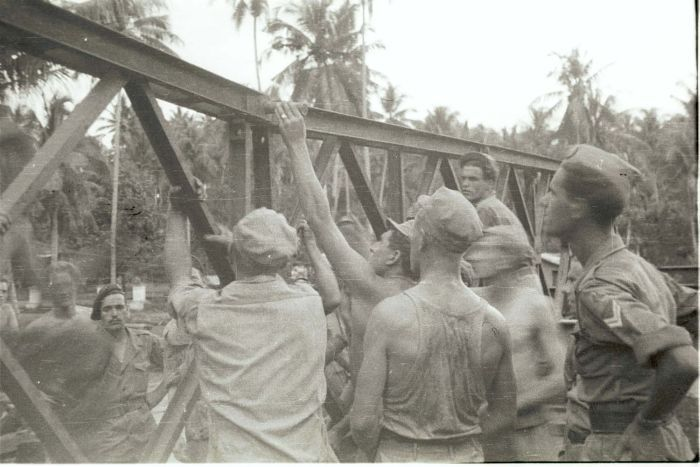 negatief. Aanleg van een baileybrug door de genie